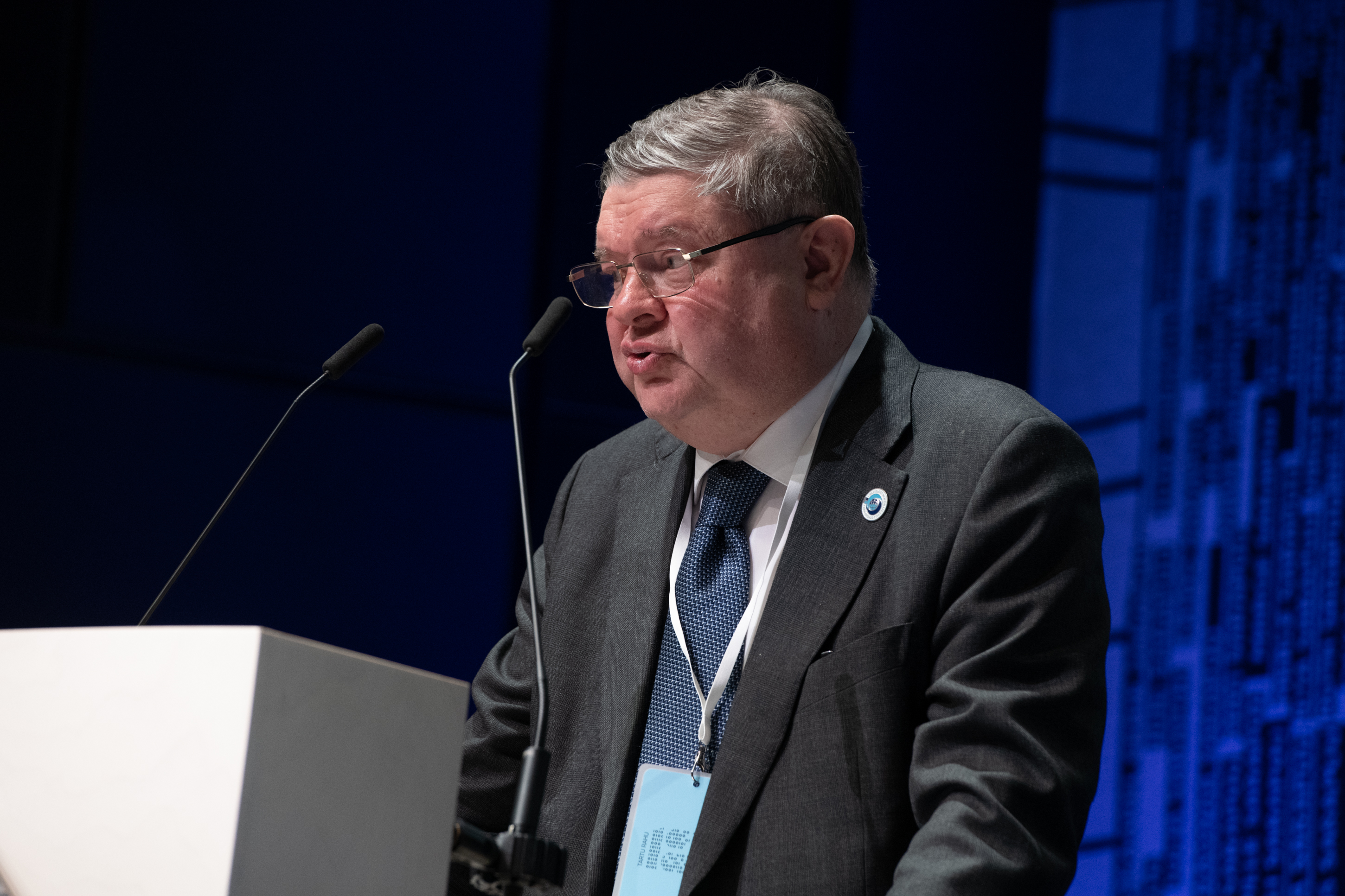 Konstantin Hudolei, Tartu rahule pühendatud rahvusvaheline välispoliitika konverents